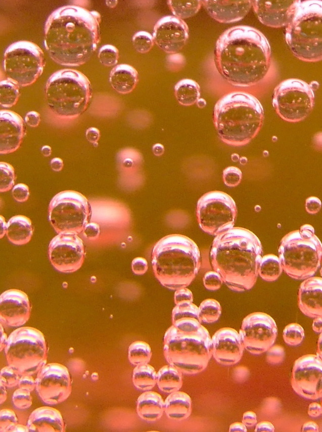 Bombolles de xampany rosat